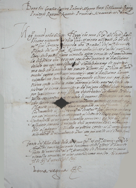 Una delle lettere autografe scritte nel 1554 da Bona Sforza, regina di Polonia, a Pompeo Lanza, patrizio capuano, suo diplomatico